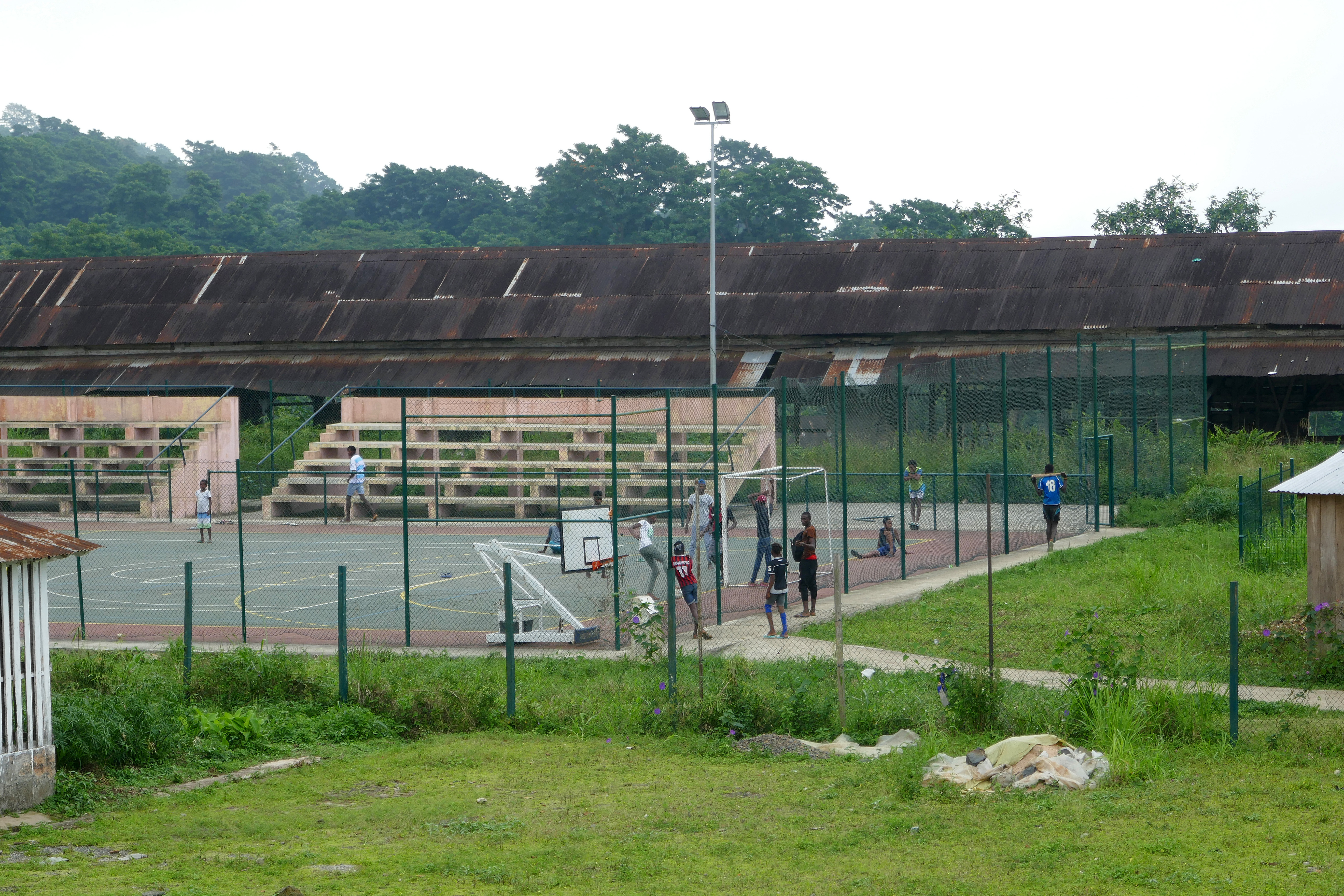 Football à Monte Café, au nord de l'île de São Tomé, dans le district de Mé-Zóchi (São Tomé-et-Principe). This is an image with the theme "Play" from: Sao Tome and Principe